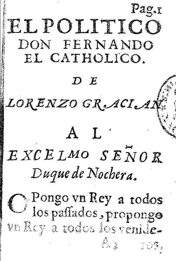 Portada de la edición: Baltasar Gracián (con el seudónimo de Lorenzo Gracián), El político don Fernando el Cathólico, Huesca, Juan Nogués, 1646.